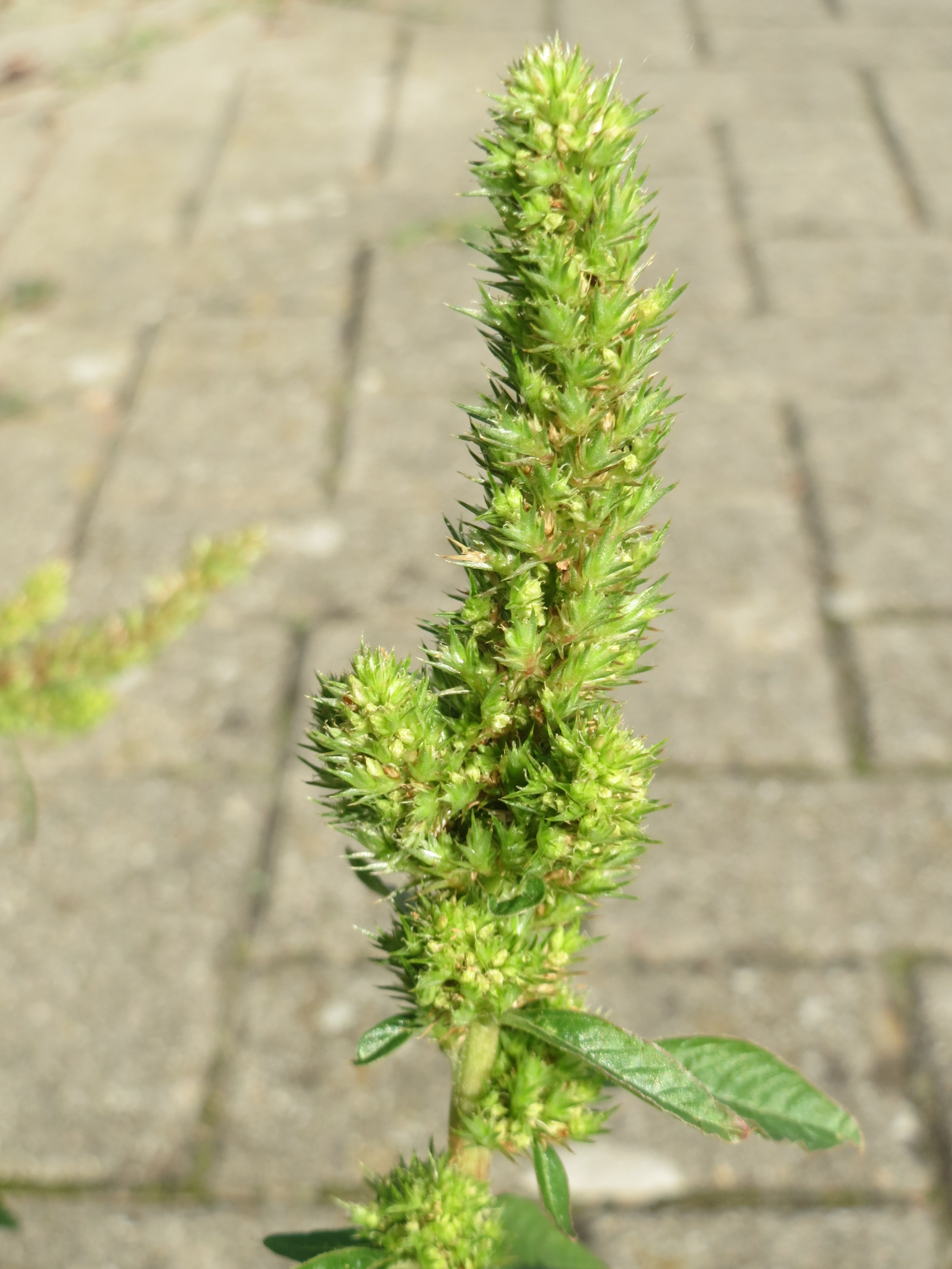 Zurückgebogener Amarant oder Acker-Fuchsschwanz (Amaranthus retroflexus) in einem Wohngebiet in Schwetzingen - eingeschleppt aus Nordamerika